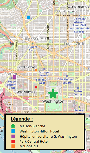 Carte des différents lieux importants de la tentative d'assassinat de Ronald Reagan en mars 1981.